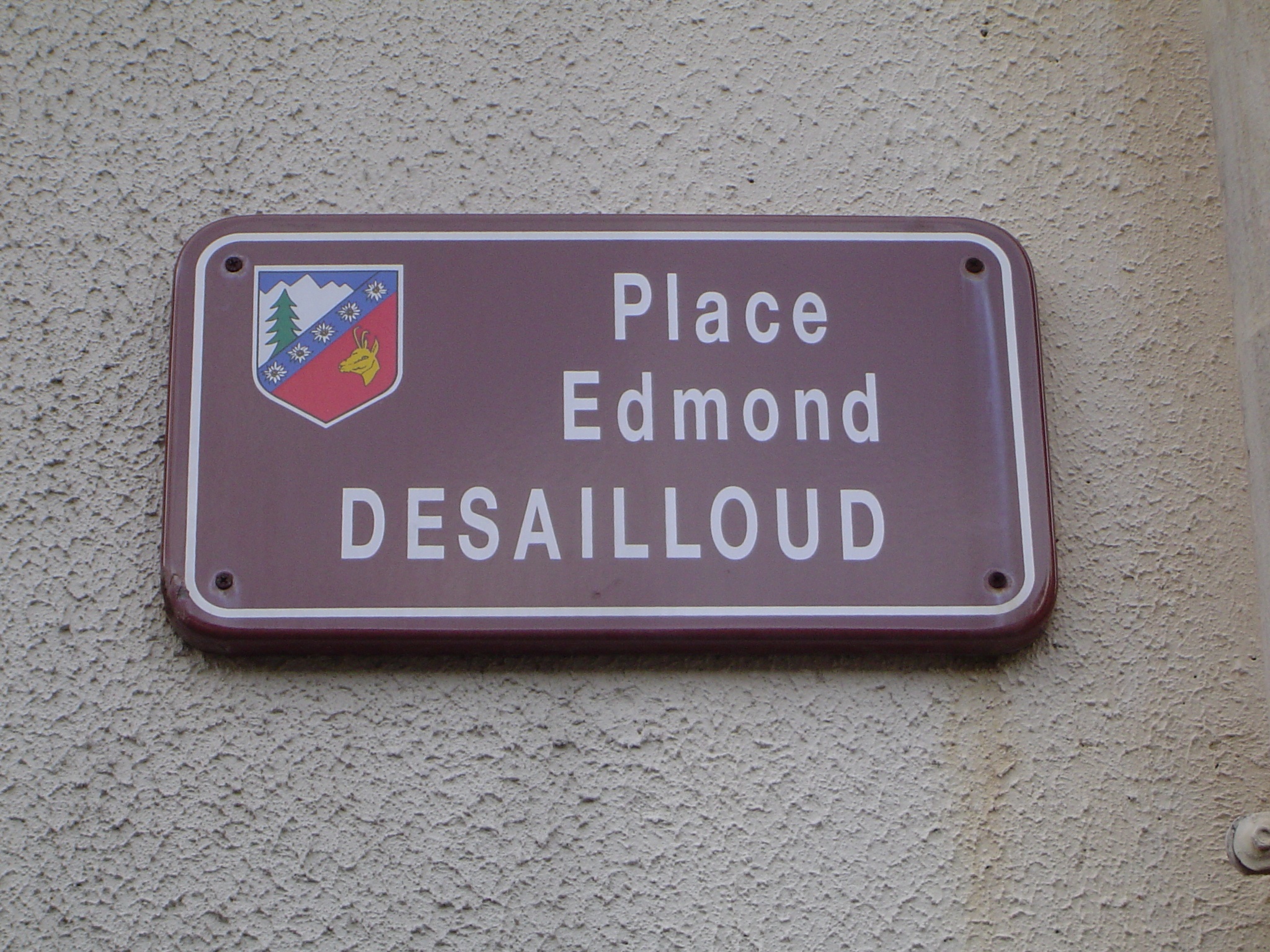 Photo prise à Chamonix-Mont-Blanc (France)